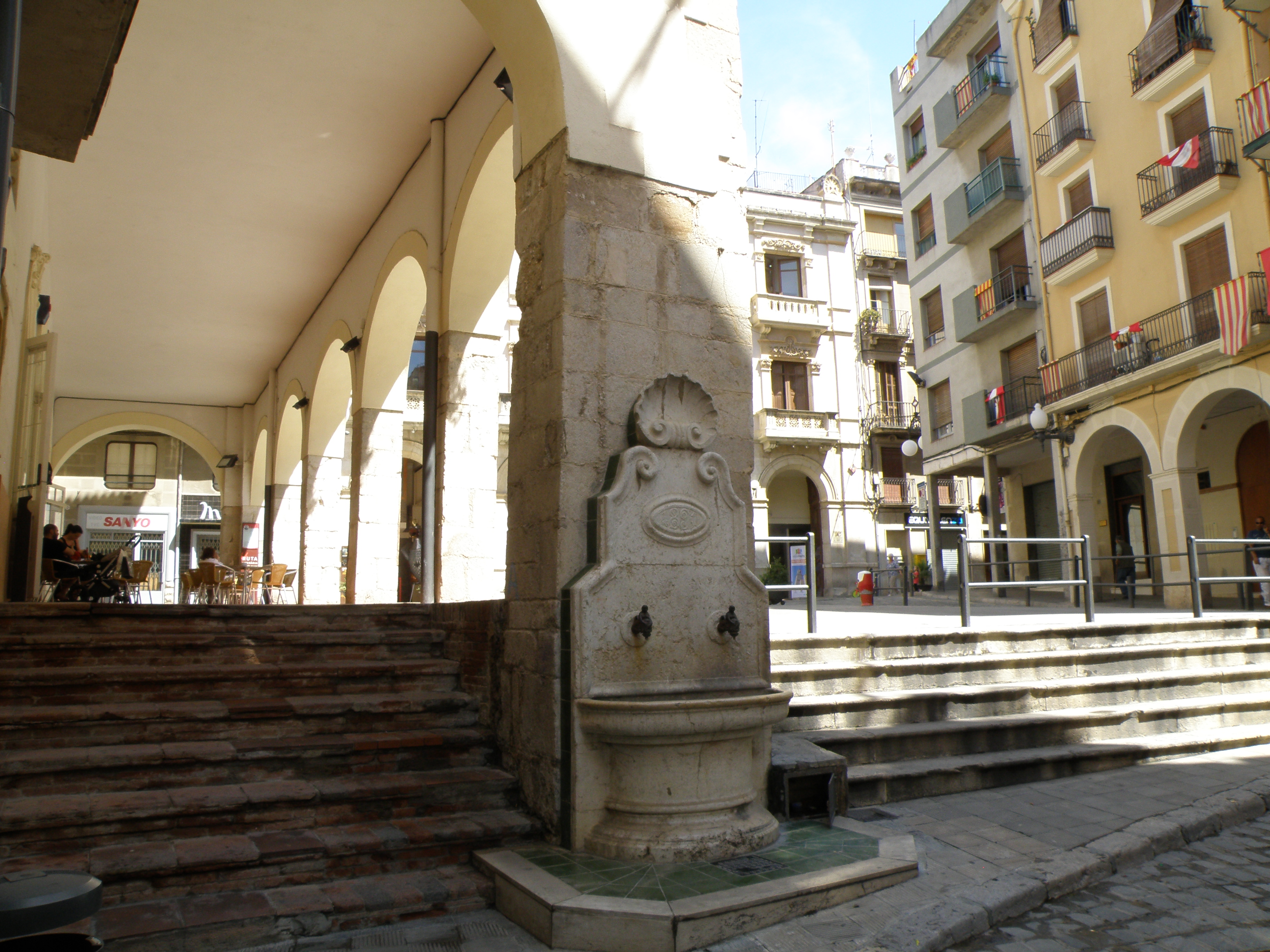 Font de la Plaça del Blat, Valls, Alt Camp.